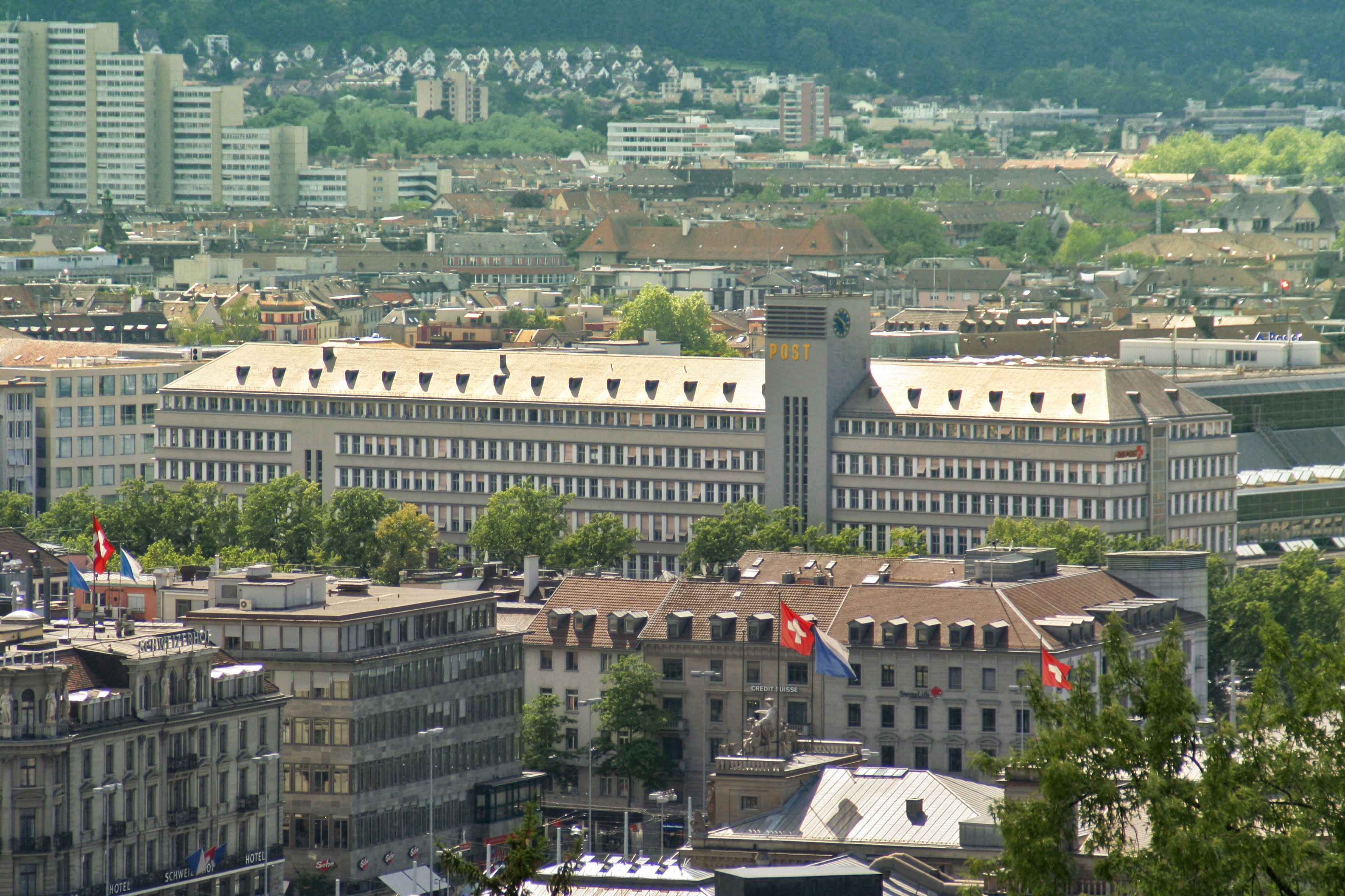 Die Sihlpost beim Zürcher Hauptbahnhof Das Gebäude beherbergte bis März 2008 eines der Briefsortierzentren. Es wird demnächst geschlossen. Architekten Gebrüder Bräm, 1923-1929